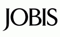 Firmenschriftzug der deutschen Konfektionsfirma JOBIS.